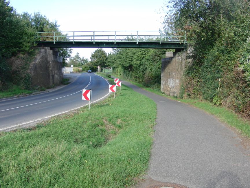 Unterfahrung der Bördebahn der DKB-Strecke nach Merzenich und der Ringbahn